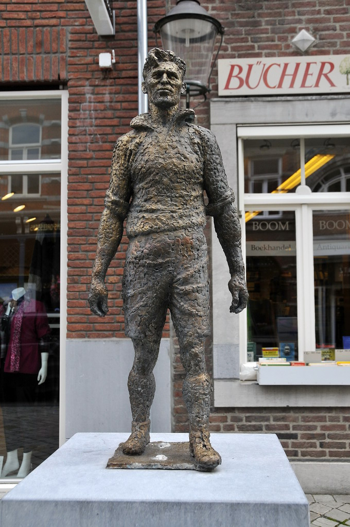 Beeld van Pierre Massy in de Neerstraat in Roermond. Dolf Wong / Lun Hing, 1967. Oorspronkelijk geplaatst in Sportpark Maashaven, herplaatst in de Neerstraat in 2010.